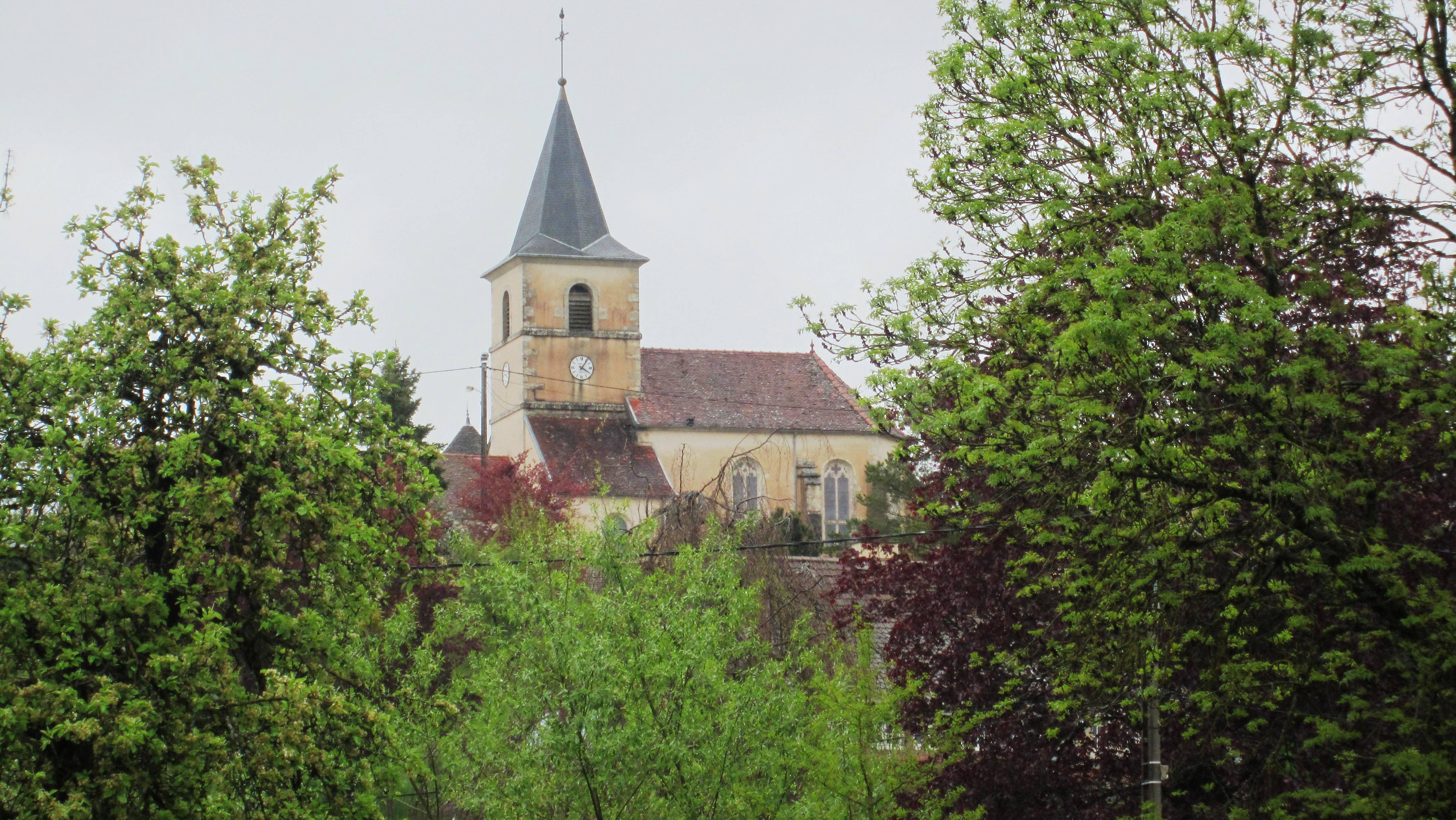 Leuglay (Côte-d'Or) : l'église